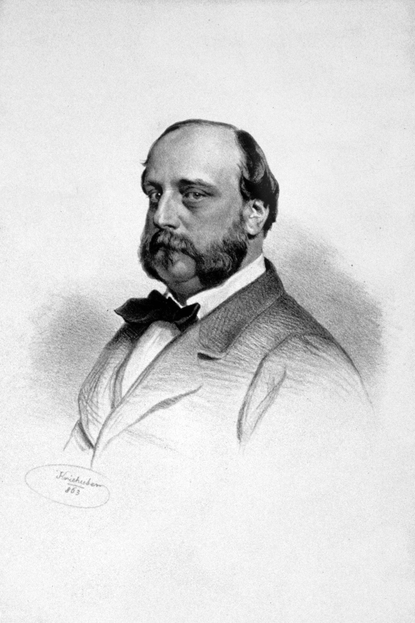 Henri Charles Ferdinand Marie Dieudonné de Bourbon-Artois, duc de Bordeaux, comte de Chambord; (1820-1883), französischer Thronprätendent. Lithographie von Josef Kriehuber, 1863